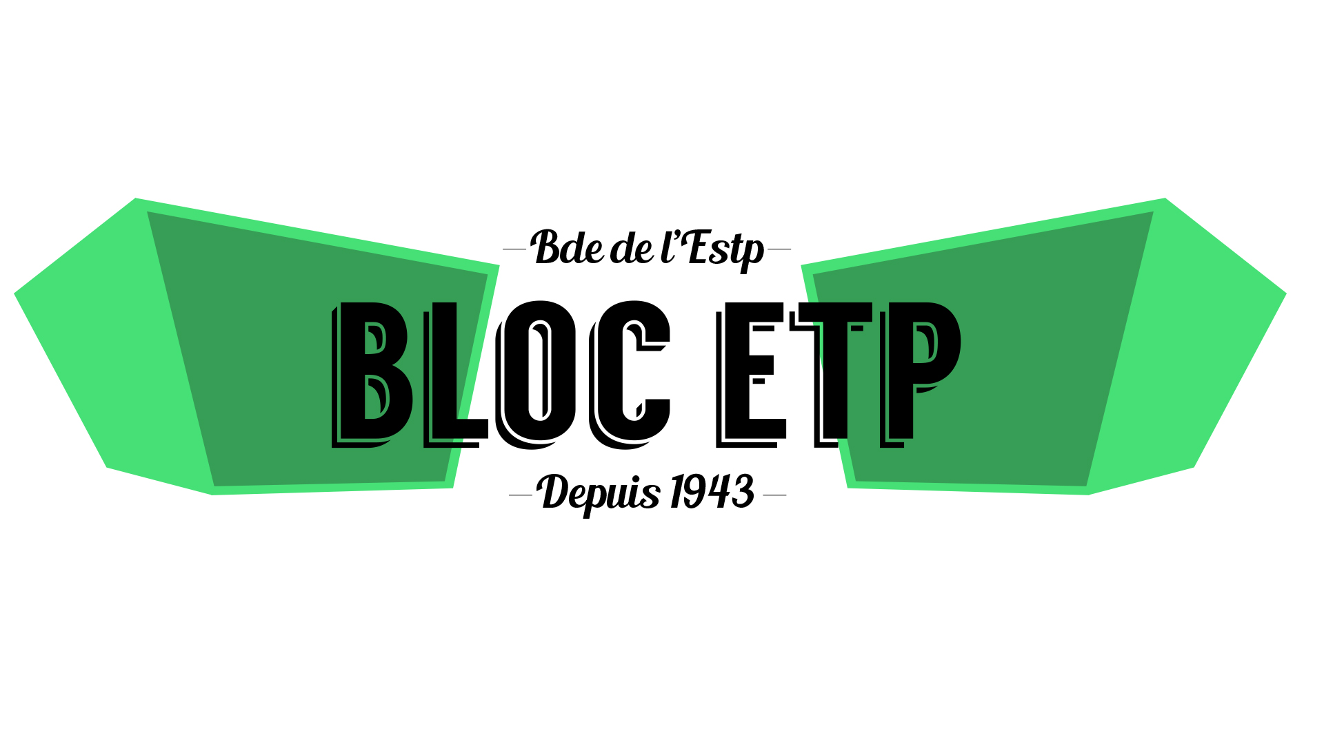 Logo du BLOC ETP